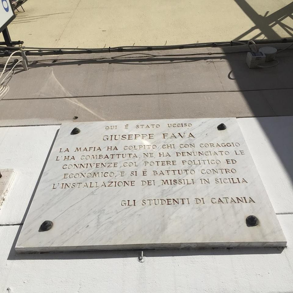 Targa in via Giuseppe Fava, Catania, nel luogo in cui fu ucciso Giuseppe Fava